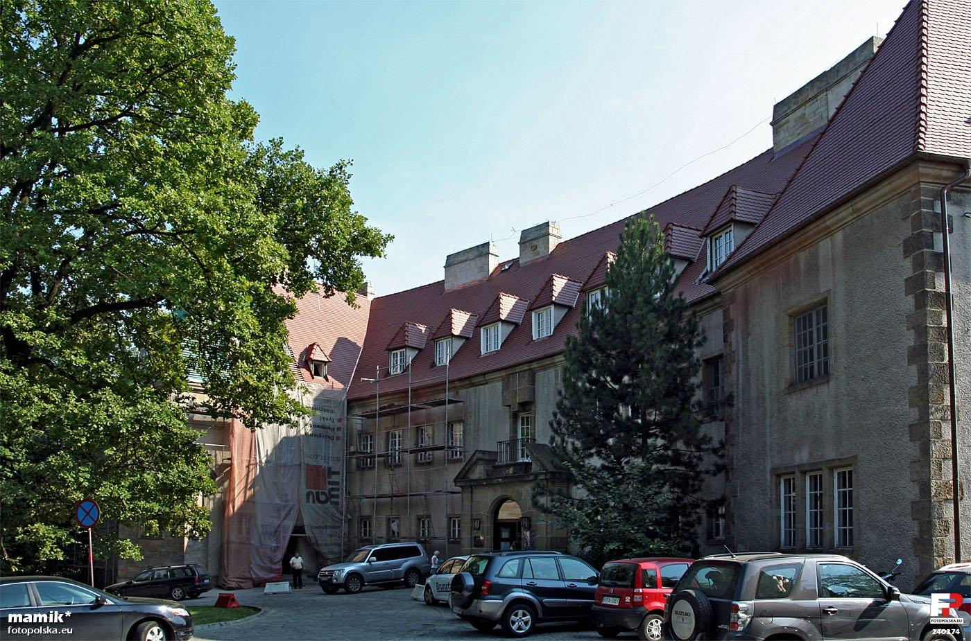 Dziedziniec przed zamkiem, zastawiony samochodami bo po południu będzie wesele